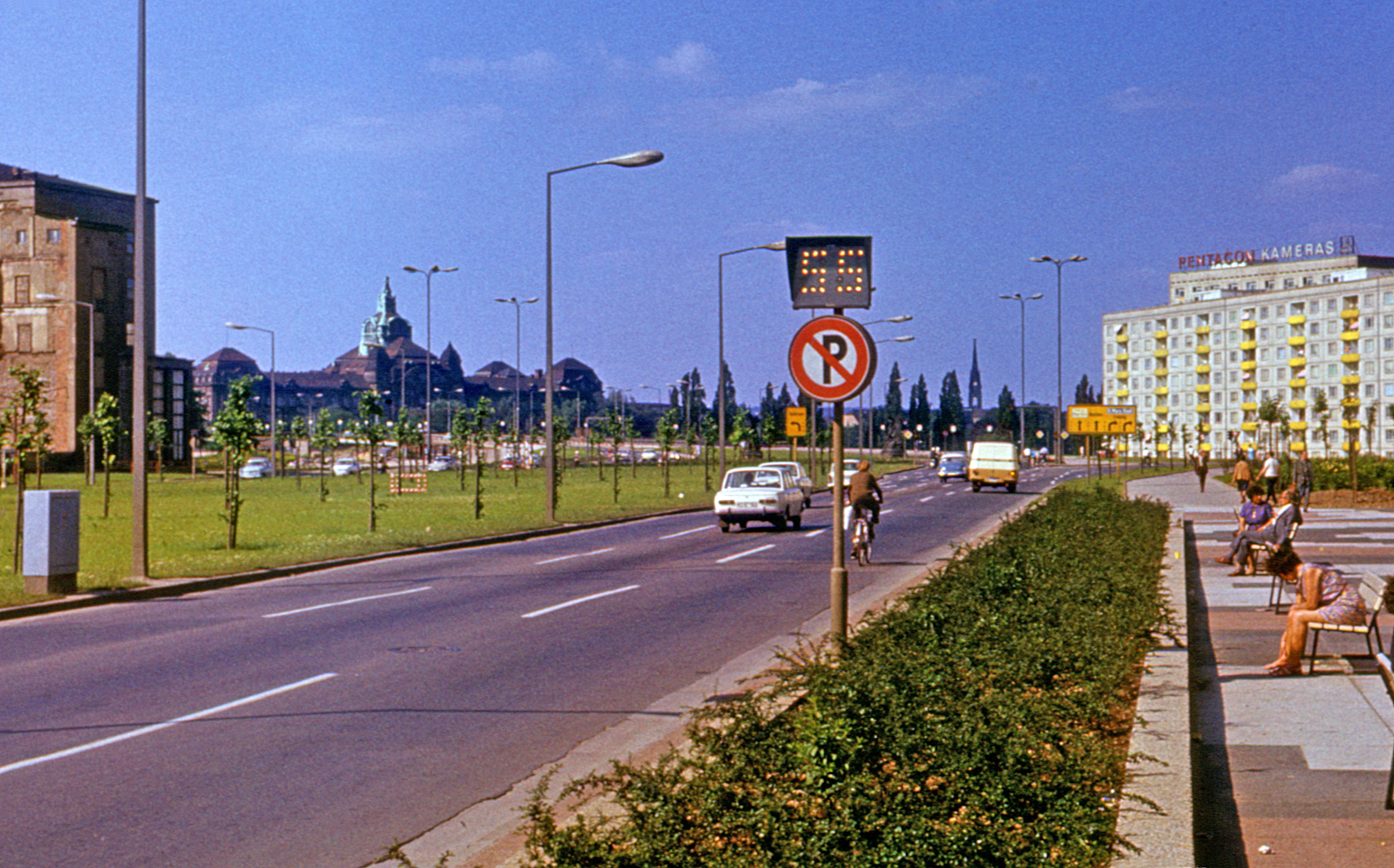 Dresden, Juni 1972: Geschwindigkeitsanzeige an der St. Petersburger Straße in Richtung Rathenauplatz